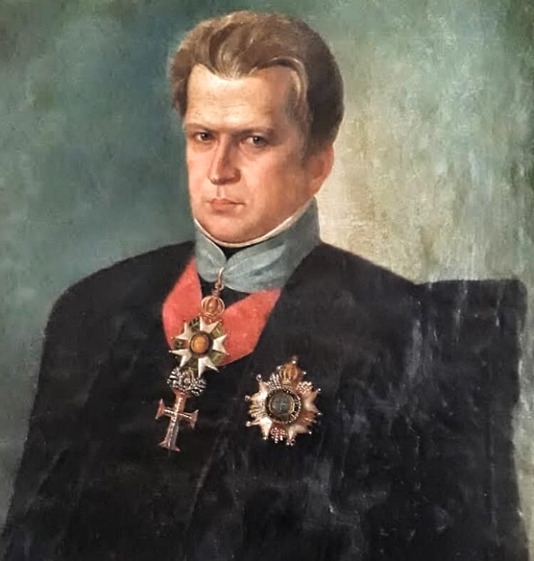 Retrato de Bernardo José da Gama, visconde com grandeza de Goiana.